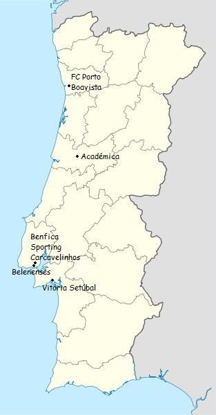 carte des équipes participantes du championnat du portugal de football 1935-1936